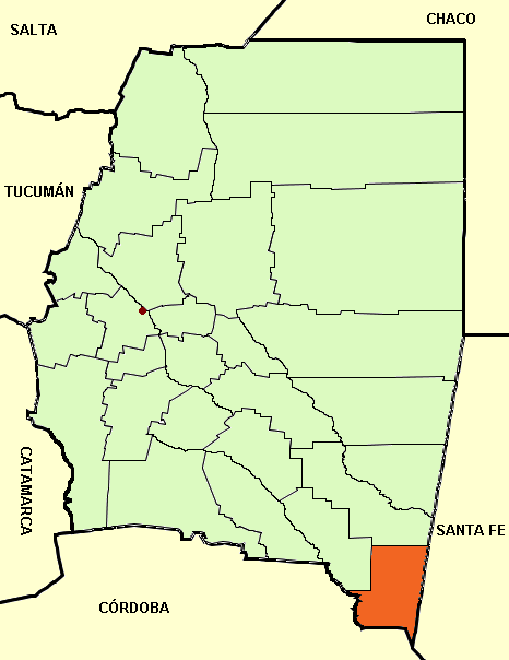 Mapa editado de: Santiago del Estero province (Argentina), departments and capital.png